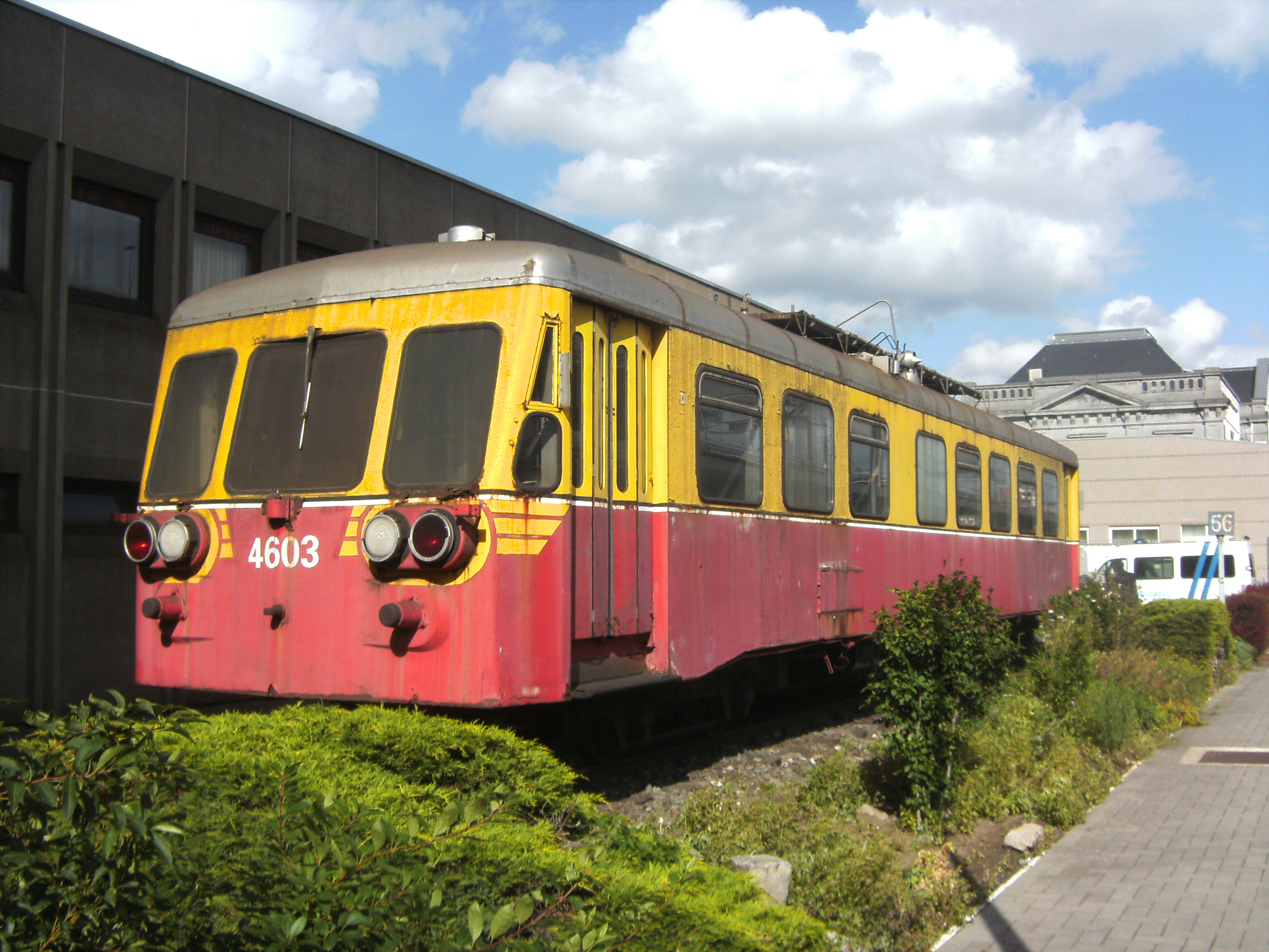 Autorail 4603 (série 46 de la SNCB) en monument sur le quai 1 de la gare de Charleroi-Sud.Après avoir été conservé à Haine-Saint-Pierre après sa radiation, l'autorail fut placé à cet endroit le 2 octobre 1999 pour les festivités des 150 ans de la gare. Après 15 ans, l'état de l'autorail s'est fortement dégradé et le 28 décembre 2015, le véhicule est emmené vers le Stoomcentrum Maldegem (SCM) auquel la SNCB l'a cédé. Source : Gwenaël Piérart, « Le 4603 quitte Charleroi-Sud », En lignes, no 131, février 2016, p. 25